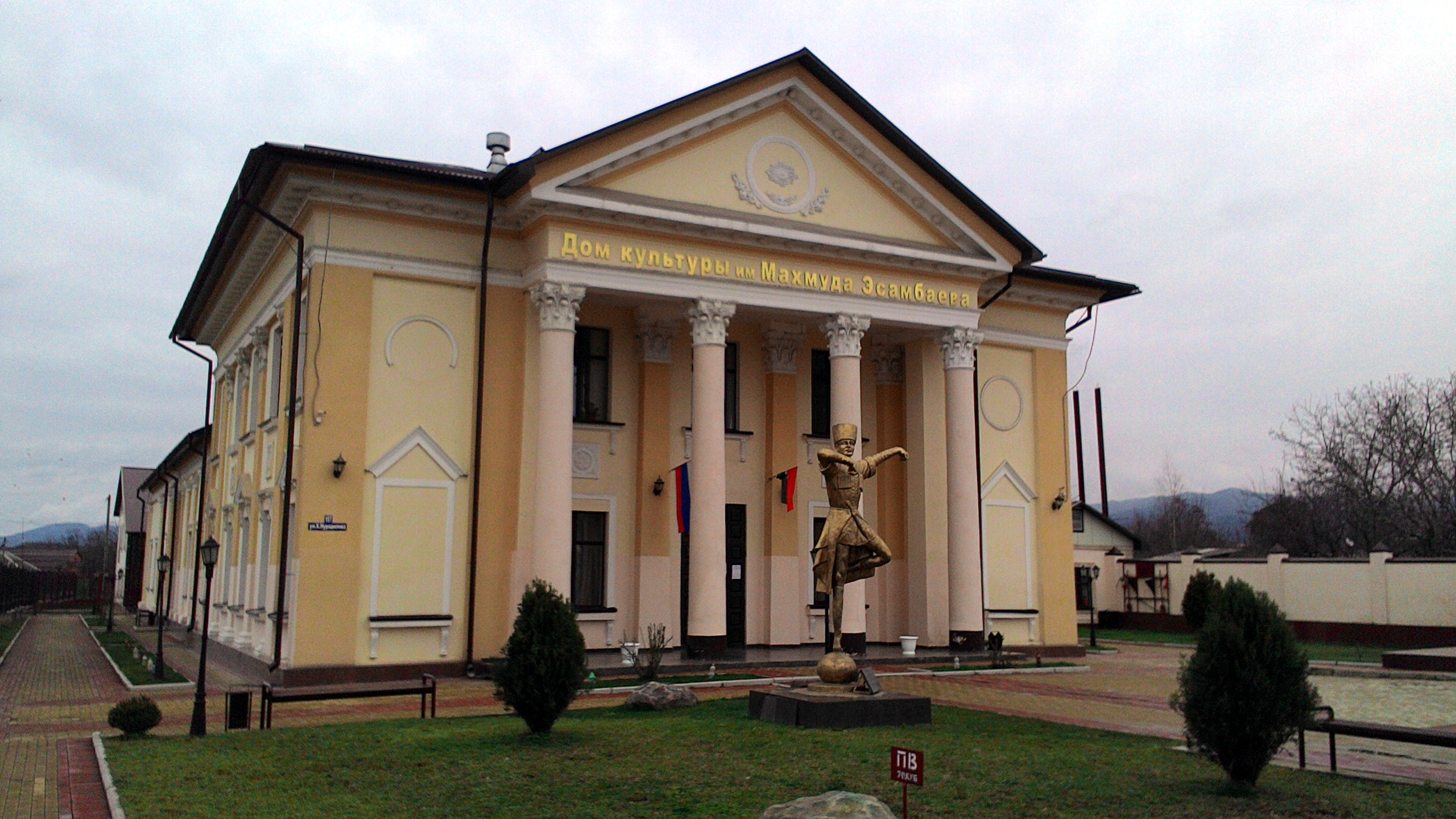 Дом культуры в селе Старые Атаги